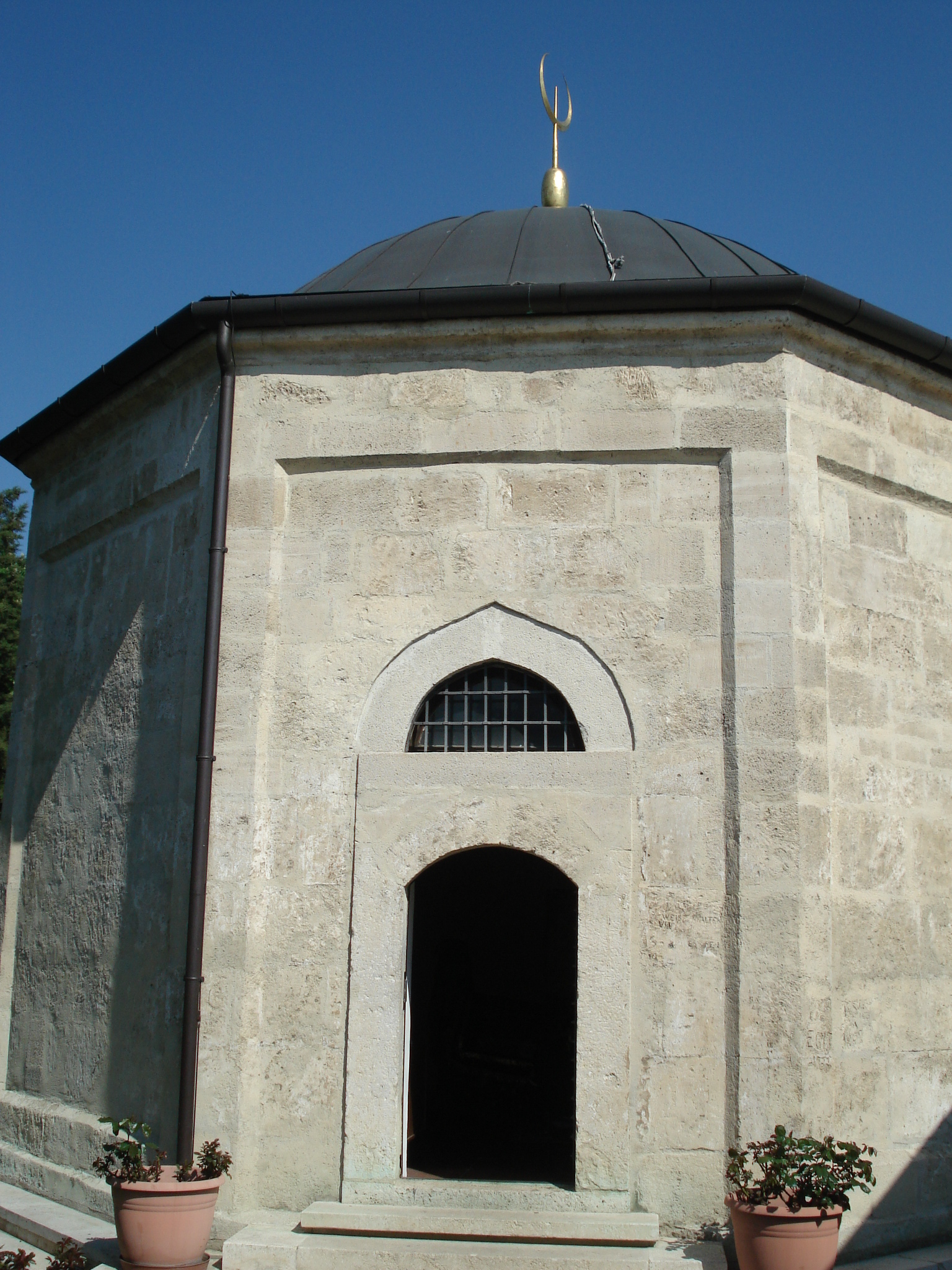 Gül Baba Türbesi